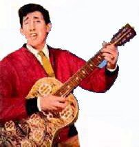 Luis Aguilé. Foto en la tapa del álbum Vol. 3 de 1957